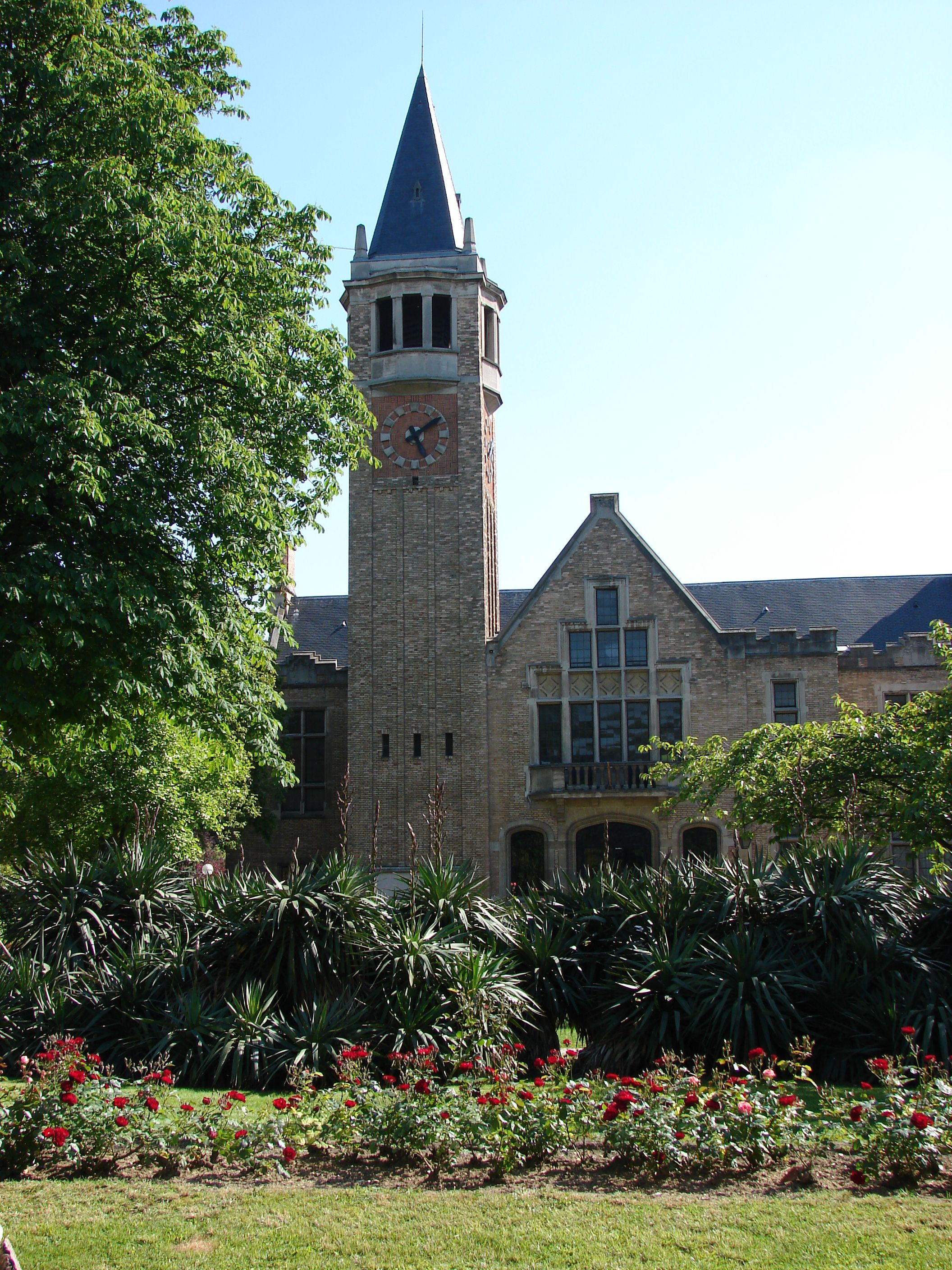 Cite Internationale Universitaire de Paris - Fondation Deutsch De La Meurthe - Pavillion Central